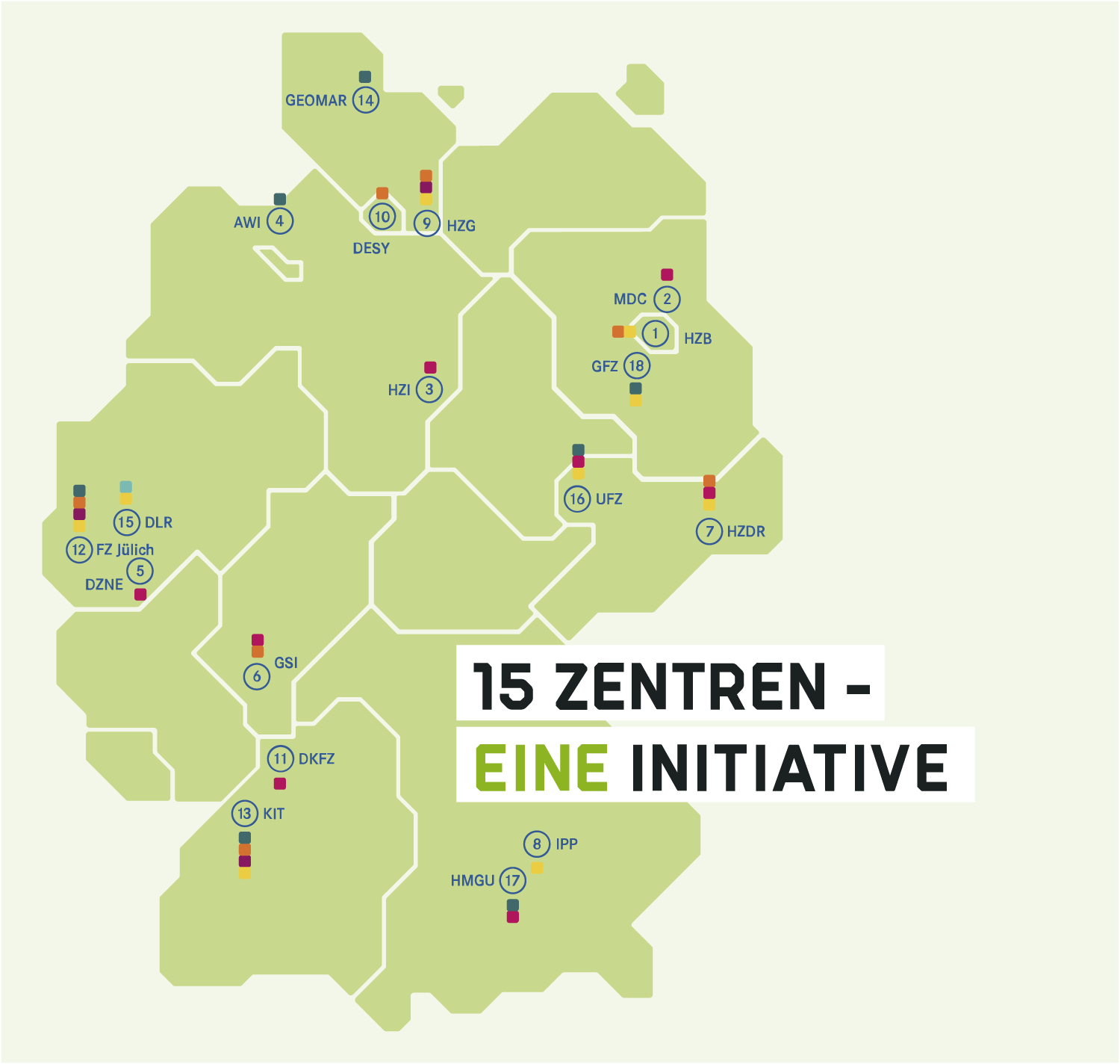 Beteiligte Zentren der Helmholtz-Klima-Initiative